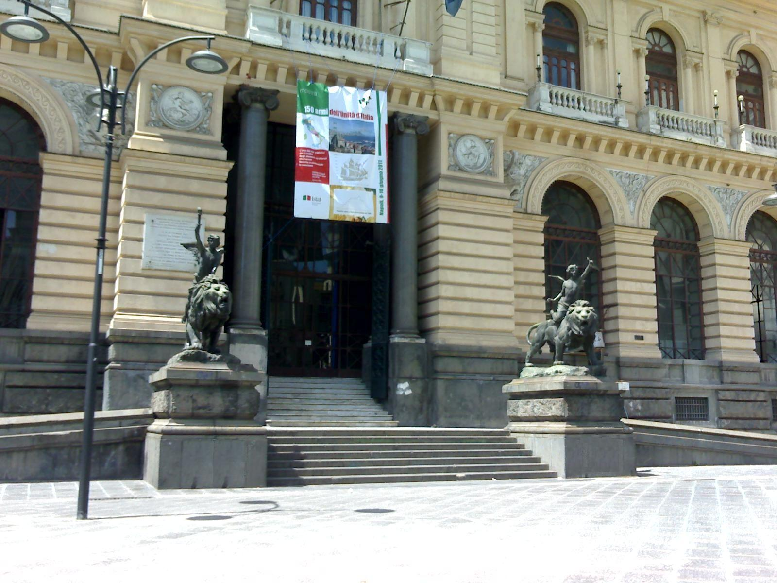 Palazzo della Borsa (Napoli). Particolare del portone d'ingresso